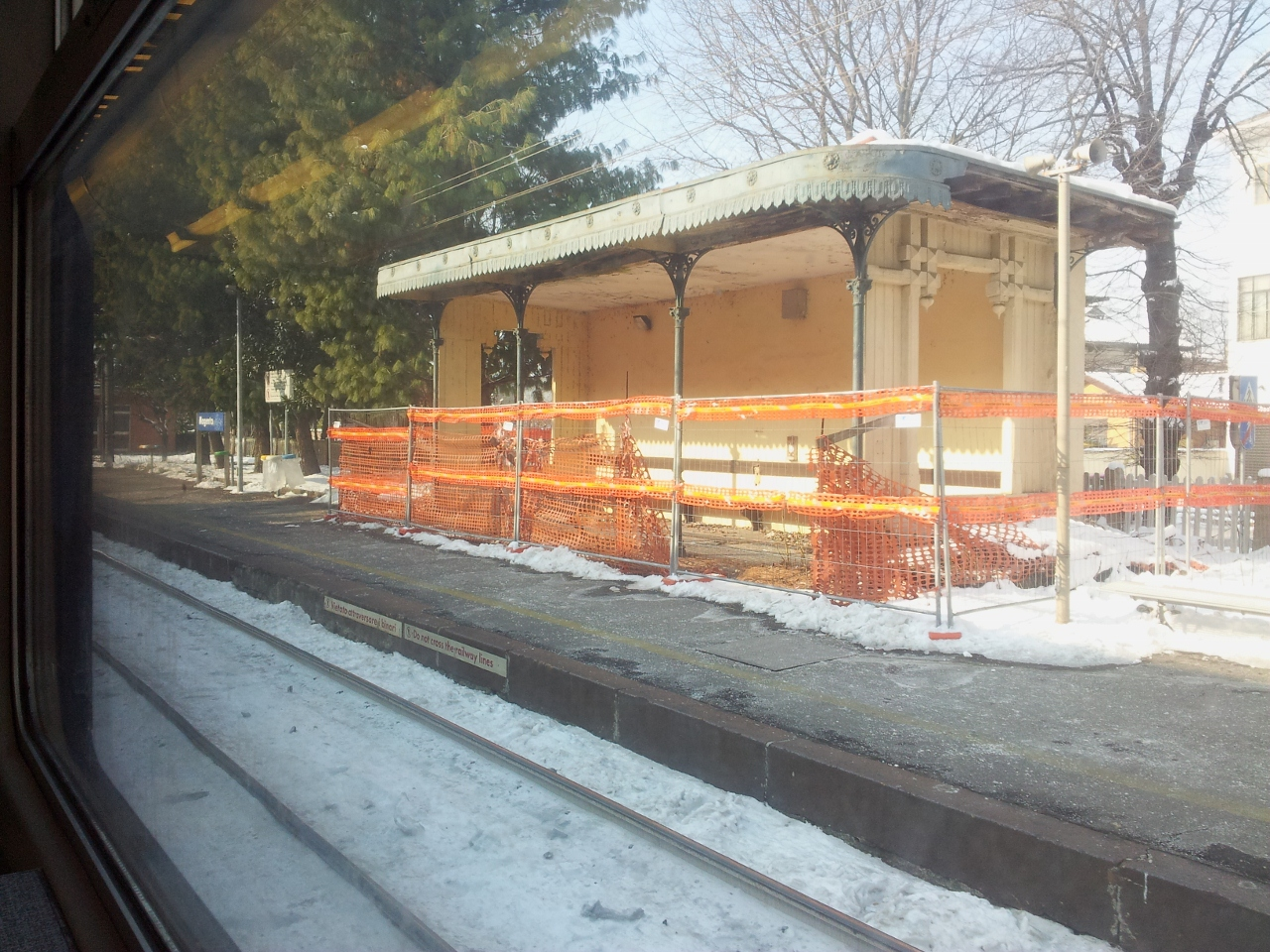 Stazione di Magenta 02/2012